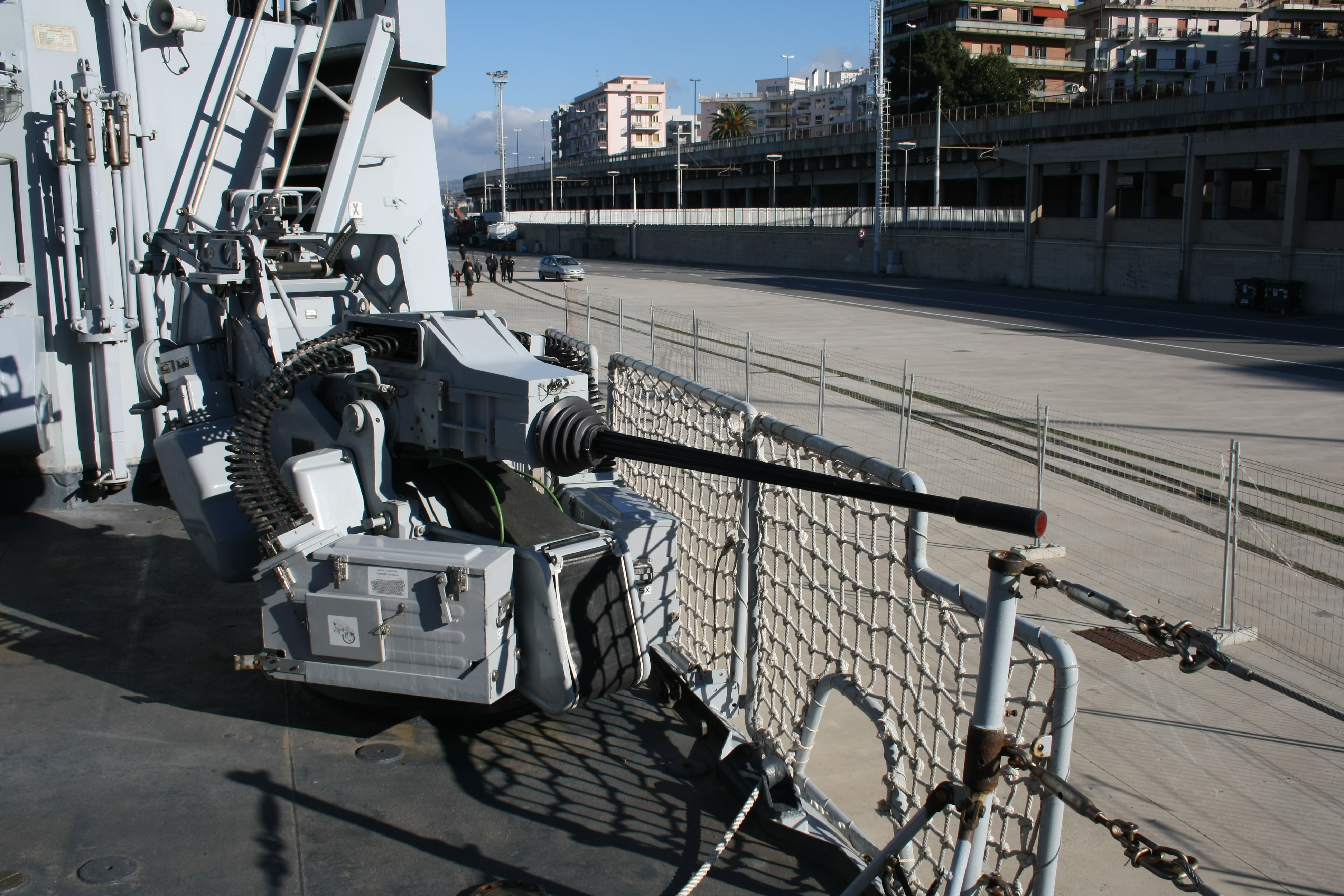 Cannone Oerlikon KBA calibro 25 mm imbarcato sulla corvetta della marina militare italiana Minerva.